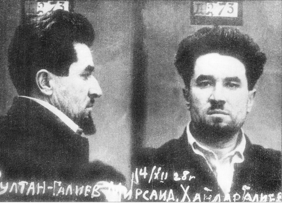 Mirsaid Sultangaliyev 14 Aralık 1928'te tutuklandığında çekildiği resmi.